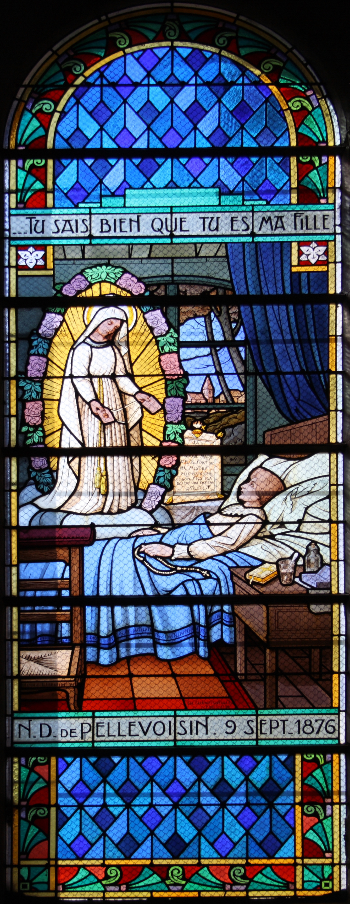 Katholische Pfarrkirche Saint-Martin in Nangis im Département Seine-et-Marne (Île-de-France/Frankreich), Bleiglasfenster mit Signatur: CH. CHAMPIGNEULLE PARIS, Darstellung: Marienerscheinung der Estelle Faguette (Notre-Dame de Pellevoisin)